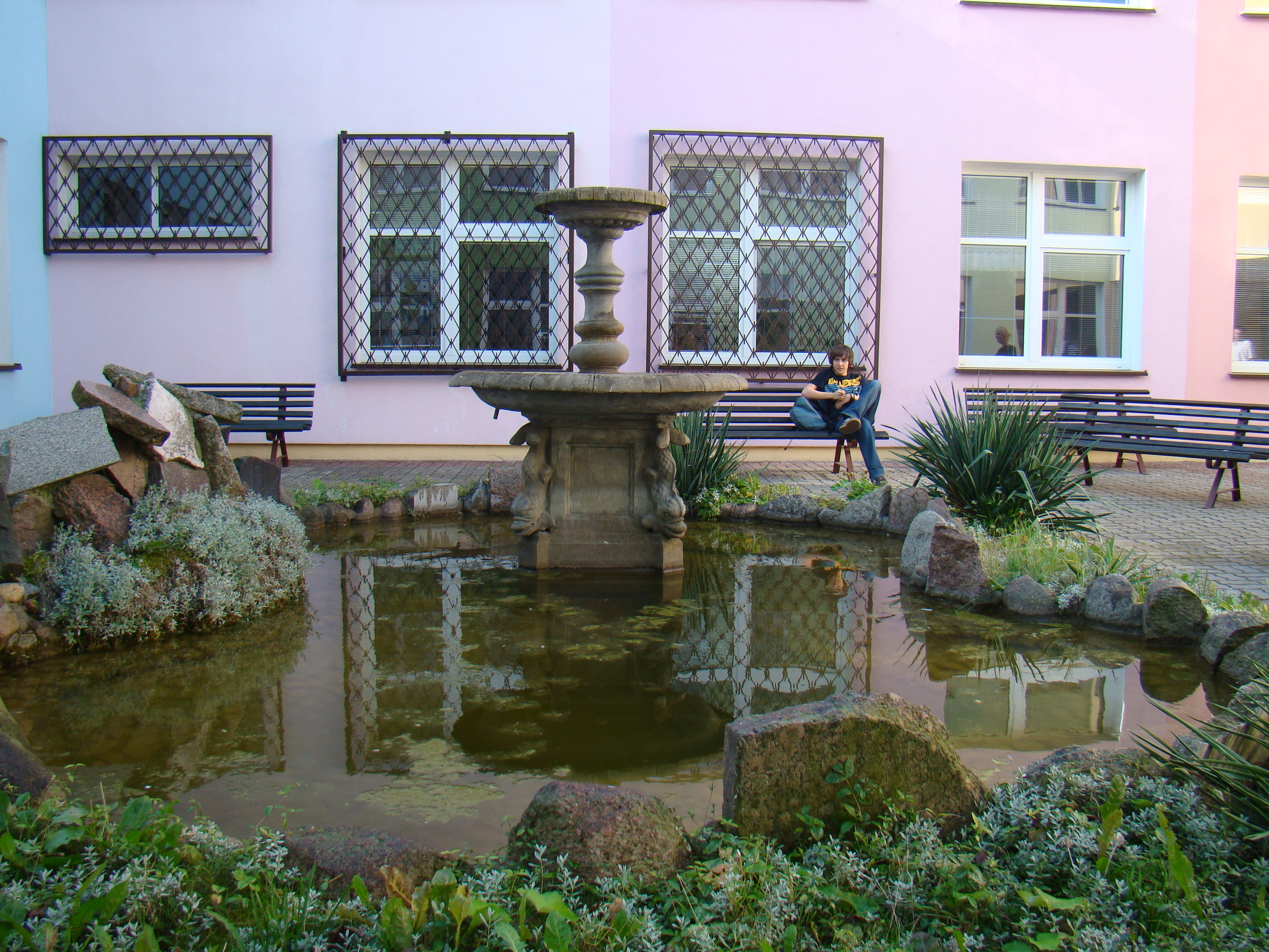 LO w Kole